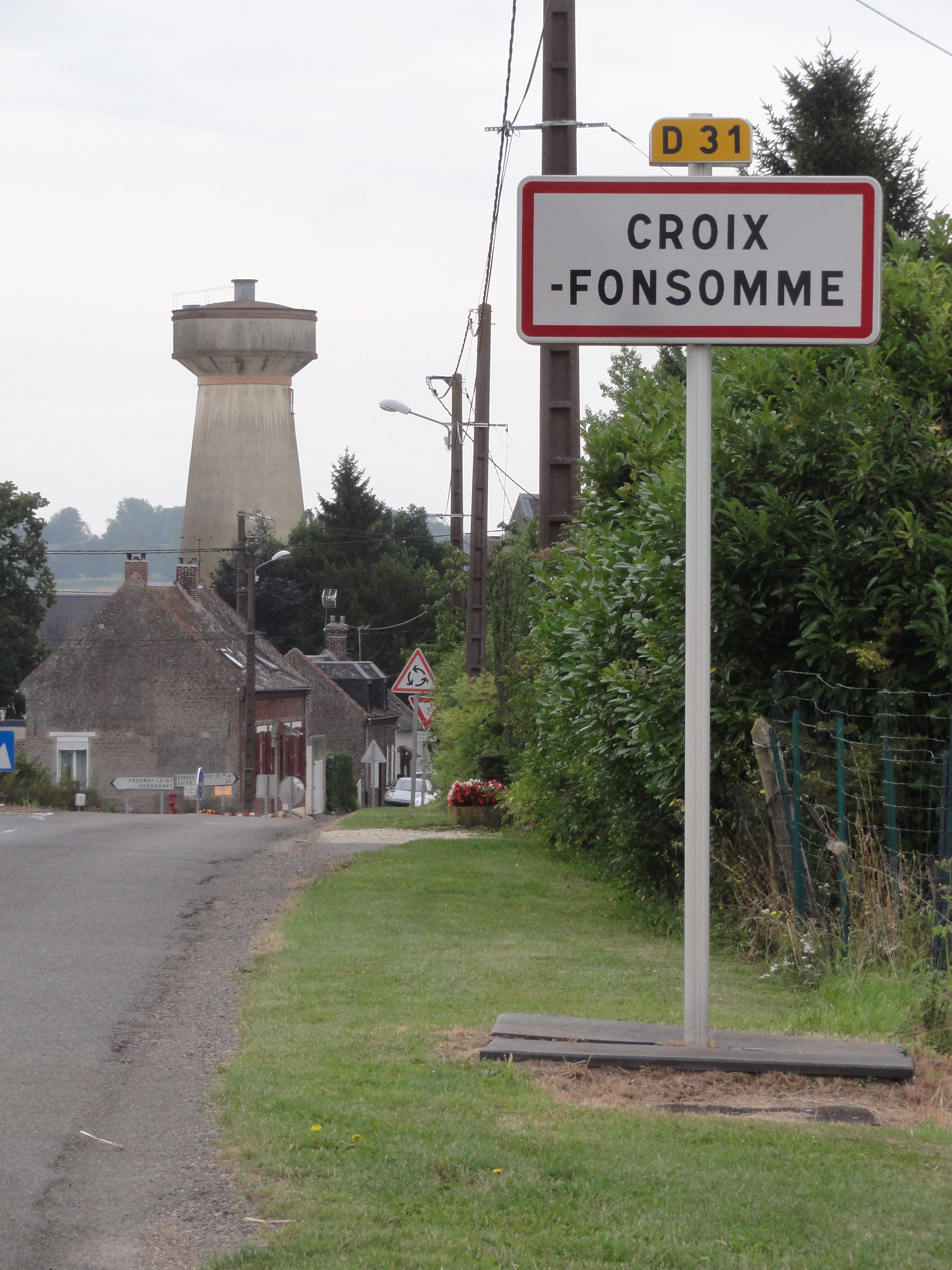 Croix-Fonsomme (Aisne) city limit sign